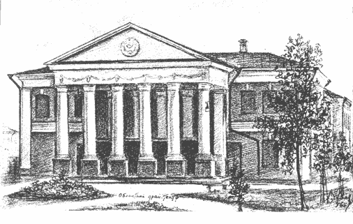 Здание Драматического театра до 1972 г. Сейчас Театр для джетей и молодежи